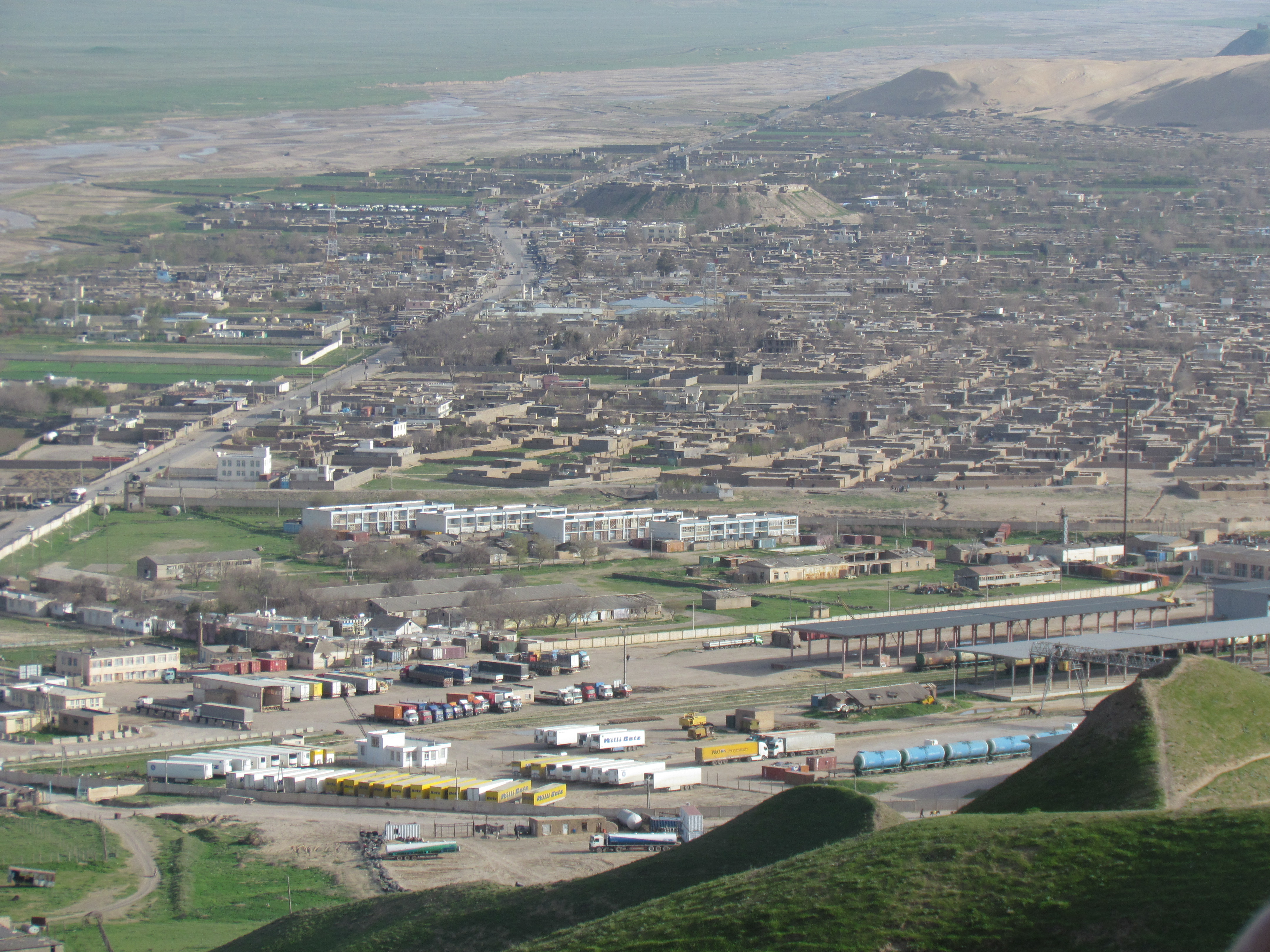 Toraghundi, or Towraghondi, is a border town in Afghanistan. It is immediately opposite to Serhetabat in Turkmenistan, with which it is connected by a road and a 1520 mm gauge railway which was restored to use in 2007